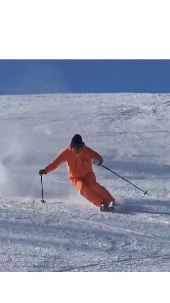 スキー技術 パラレルターン